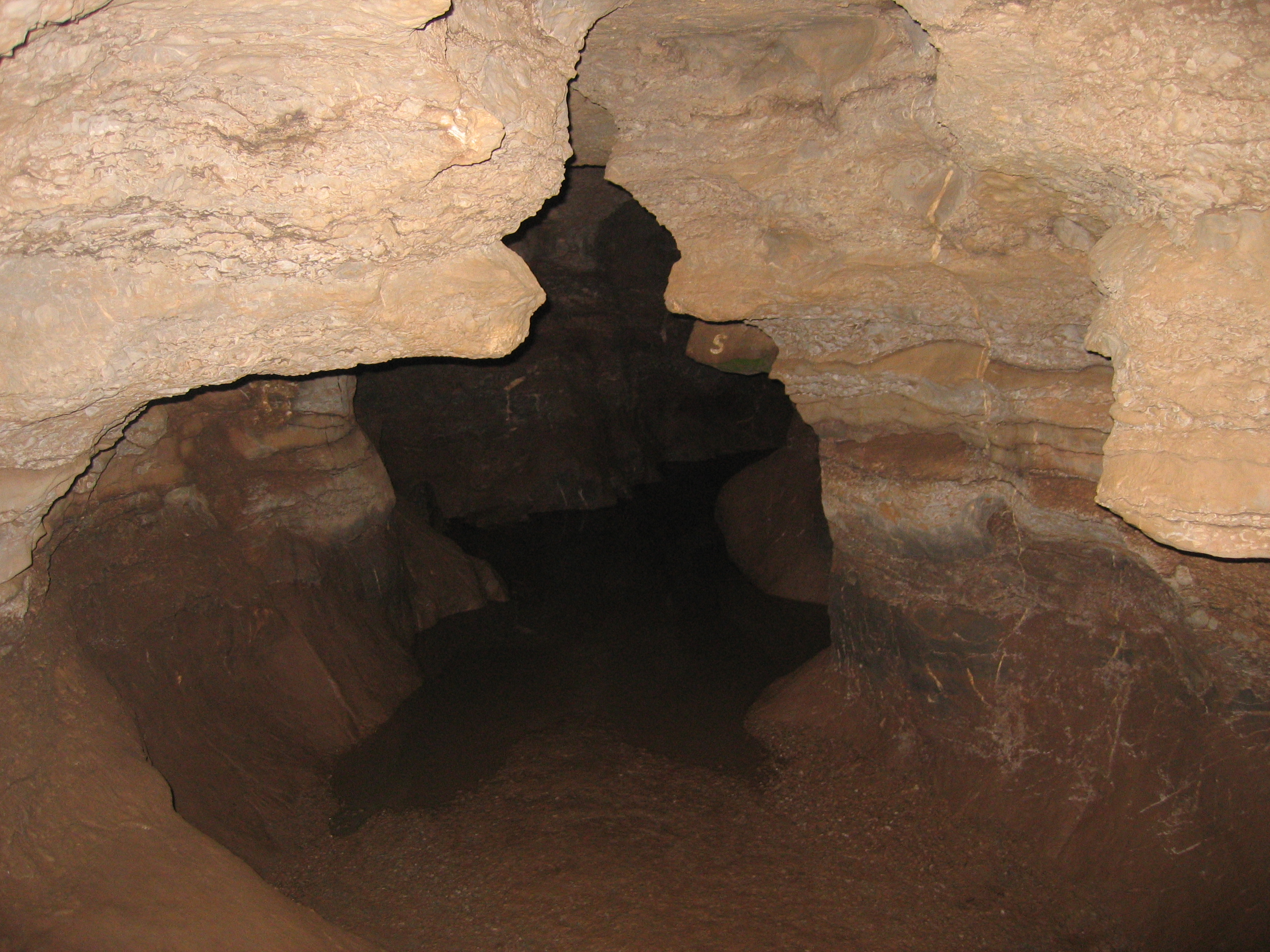 Aggertalhöhle in Engelskirchen-Ründeroth